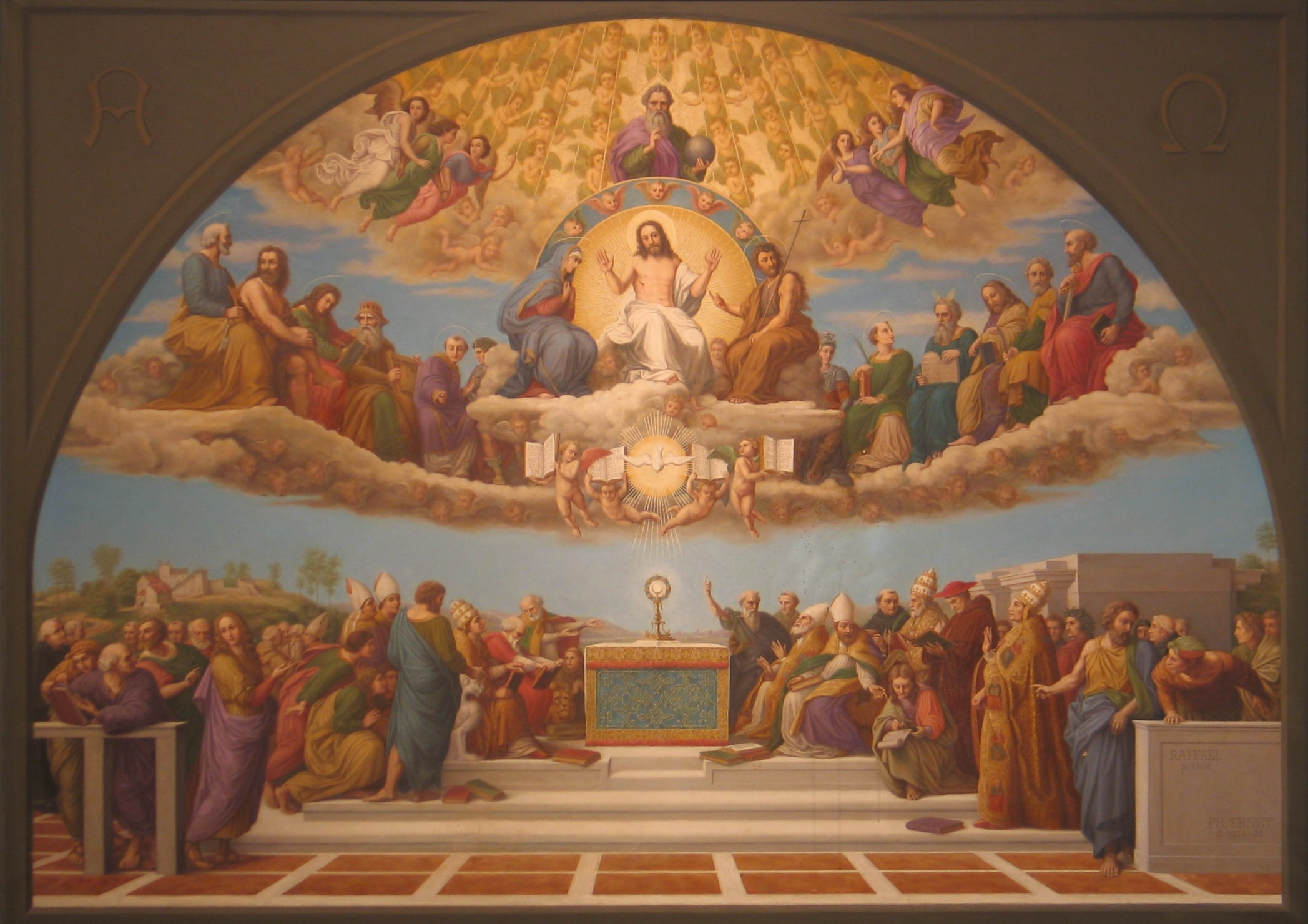 Philipp Ernst, Disputa nach Raffael, 1924-1932 Öl auf Leinwand, 145 x 205 cm, signiert l. u. RAFFAEL p. 1508, r.u. PH. ERNST c. 1924-32